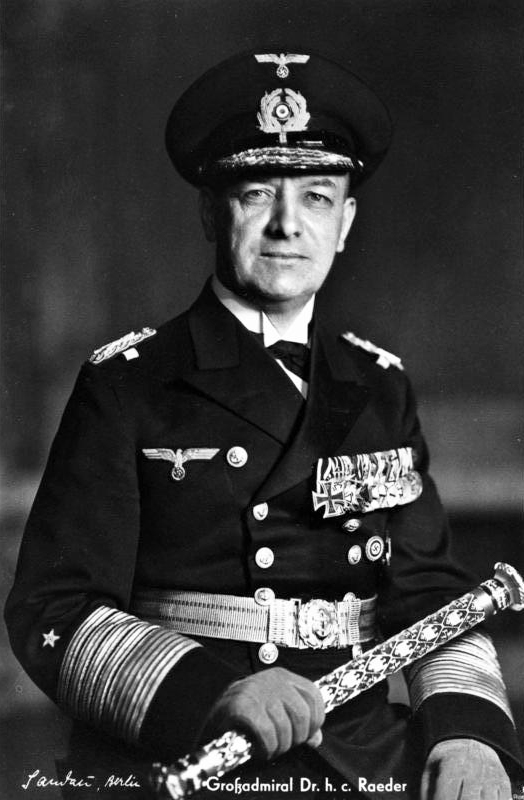 Großadmiral Dr. h.c. Raeder R.20 "Ross" Verlag